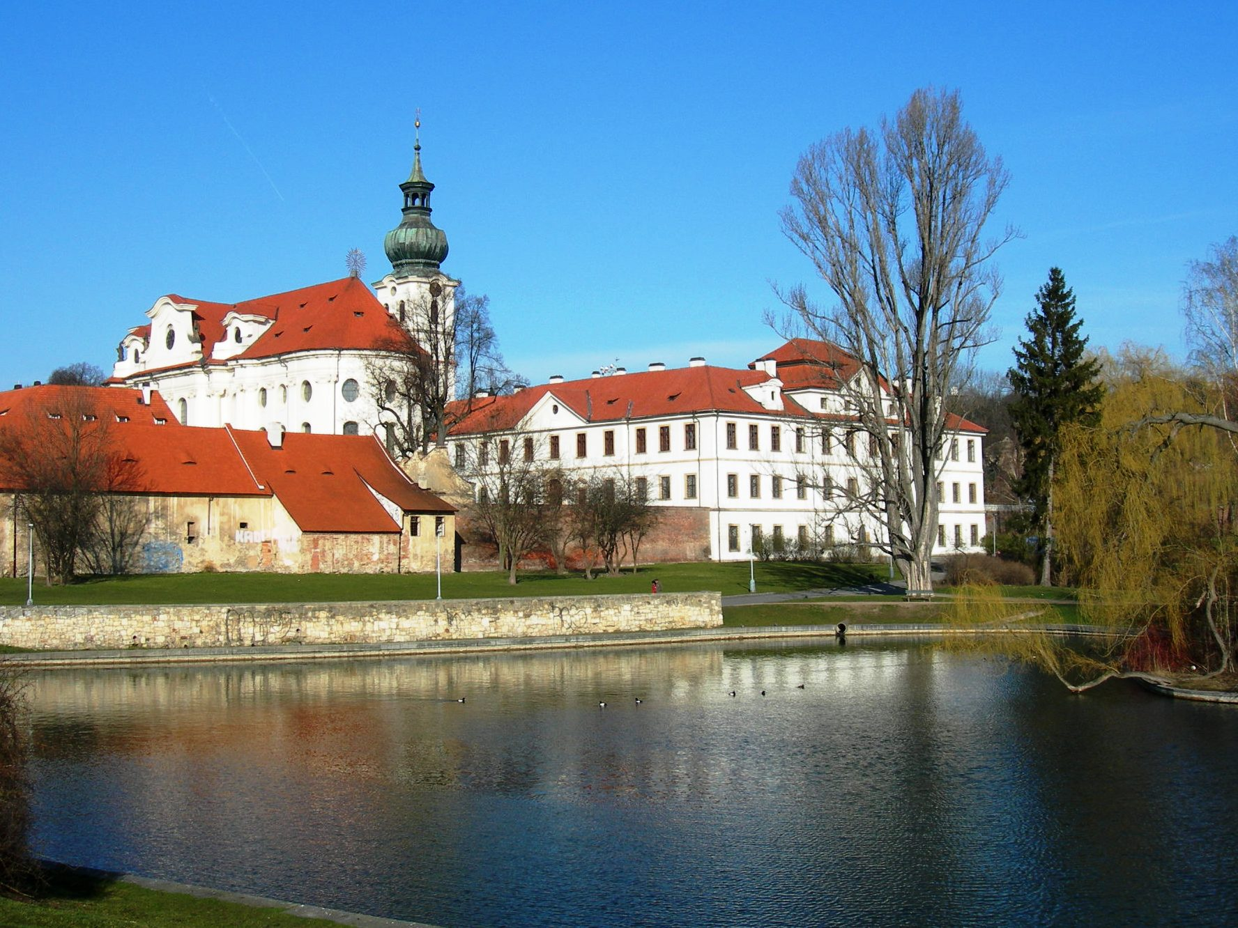 Praha Břevnov, Monastery St. Marketa from SE